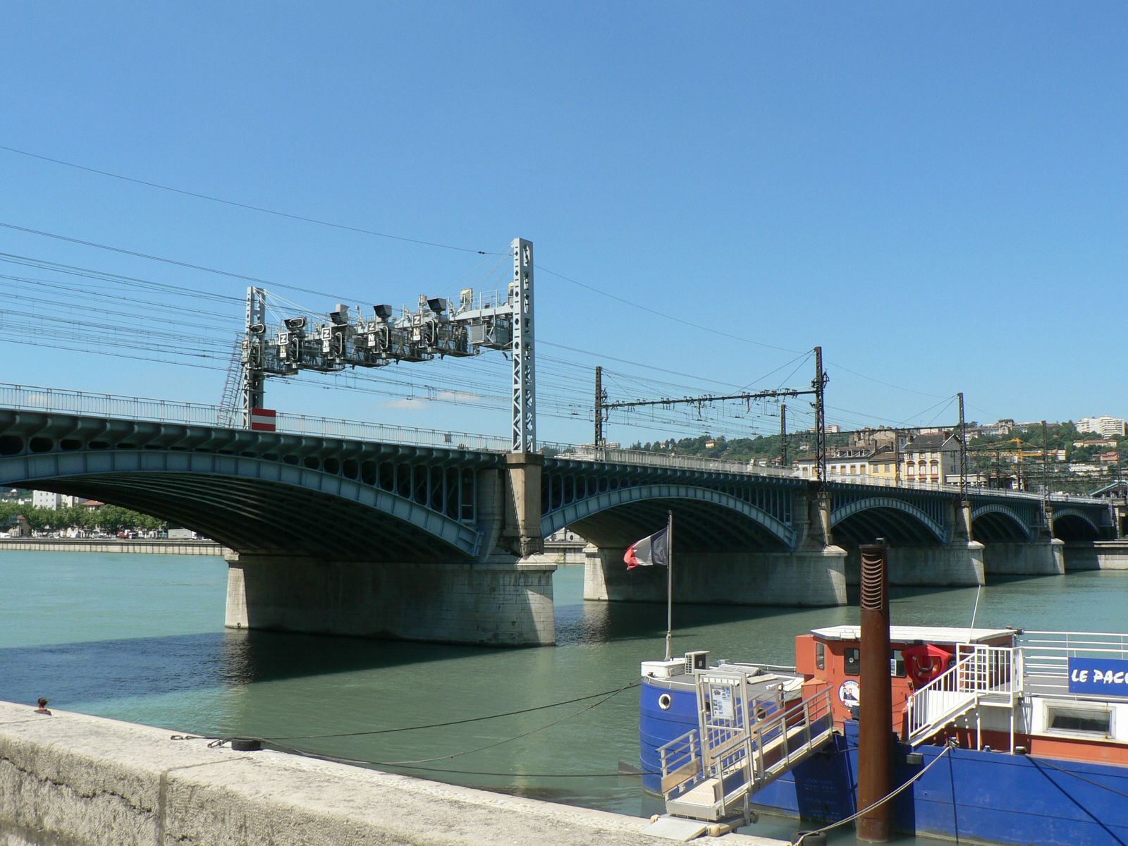 Ponts de Lyon – Viaduc SNCF (Perrache) en aval du pont Gallieni